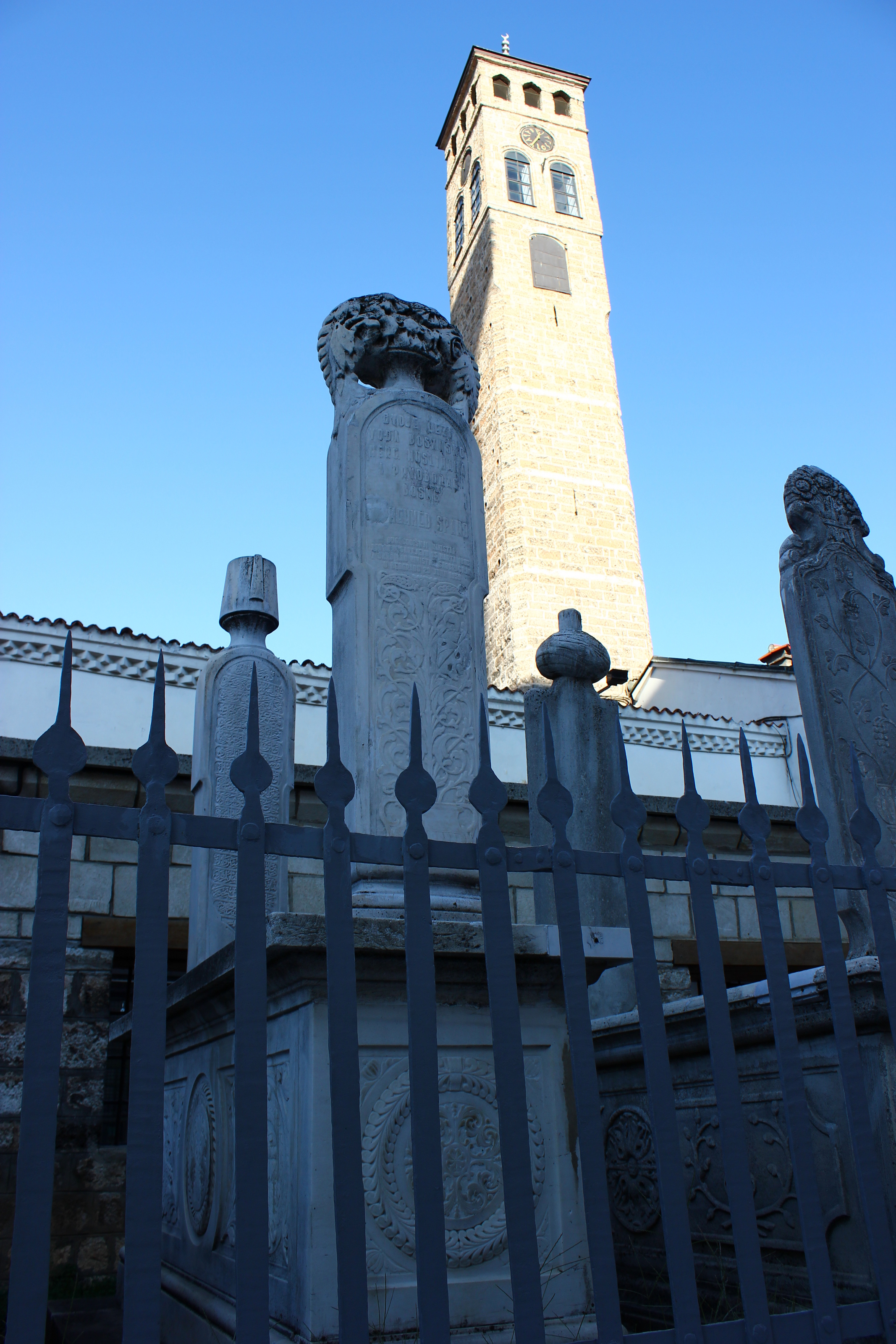 Grabstein von Mehmed Spaho auf dem Hof der Gazi-Husrev-Beg-Moschee in Sarajevo.